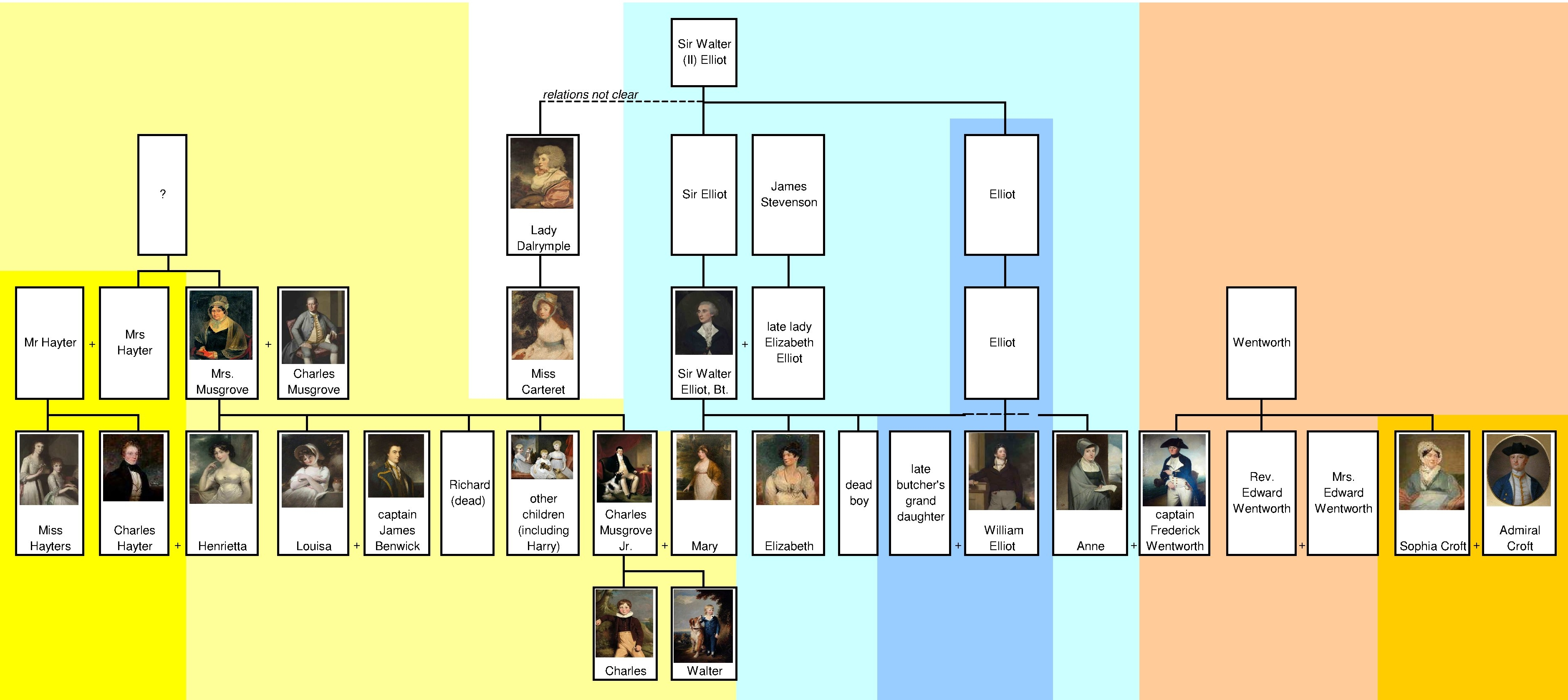 Генеалогическое древо, "Доводы рассудка", Джейн Остин